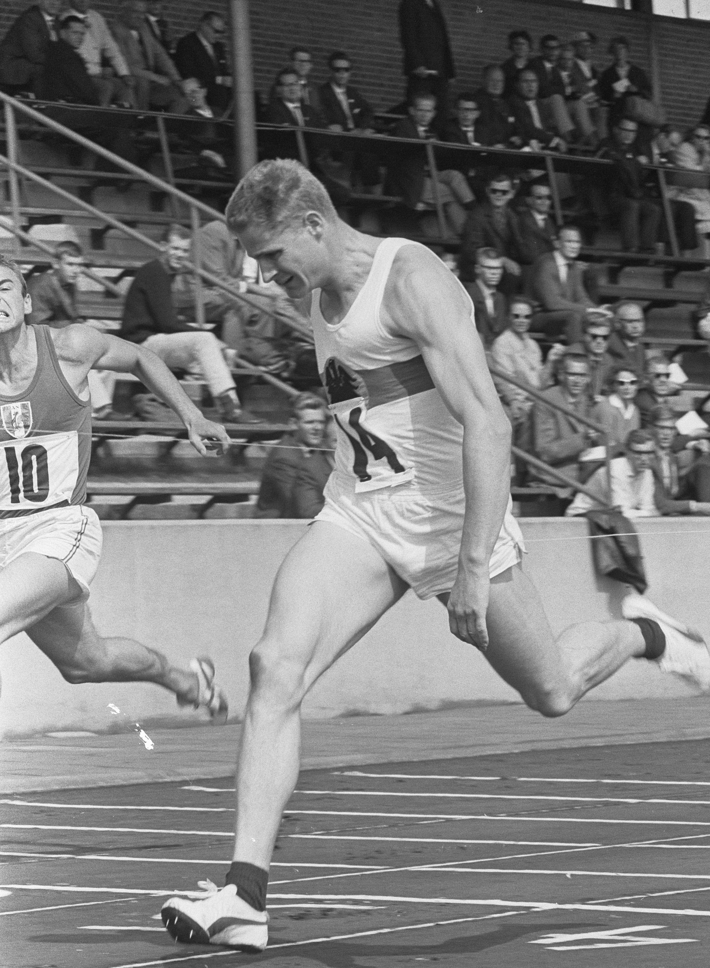 Tienkamper Werner von Moltke (Duitsland) )